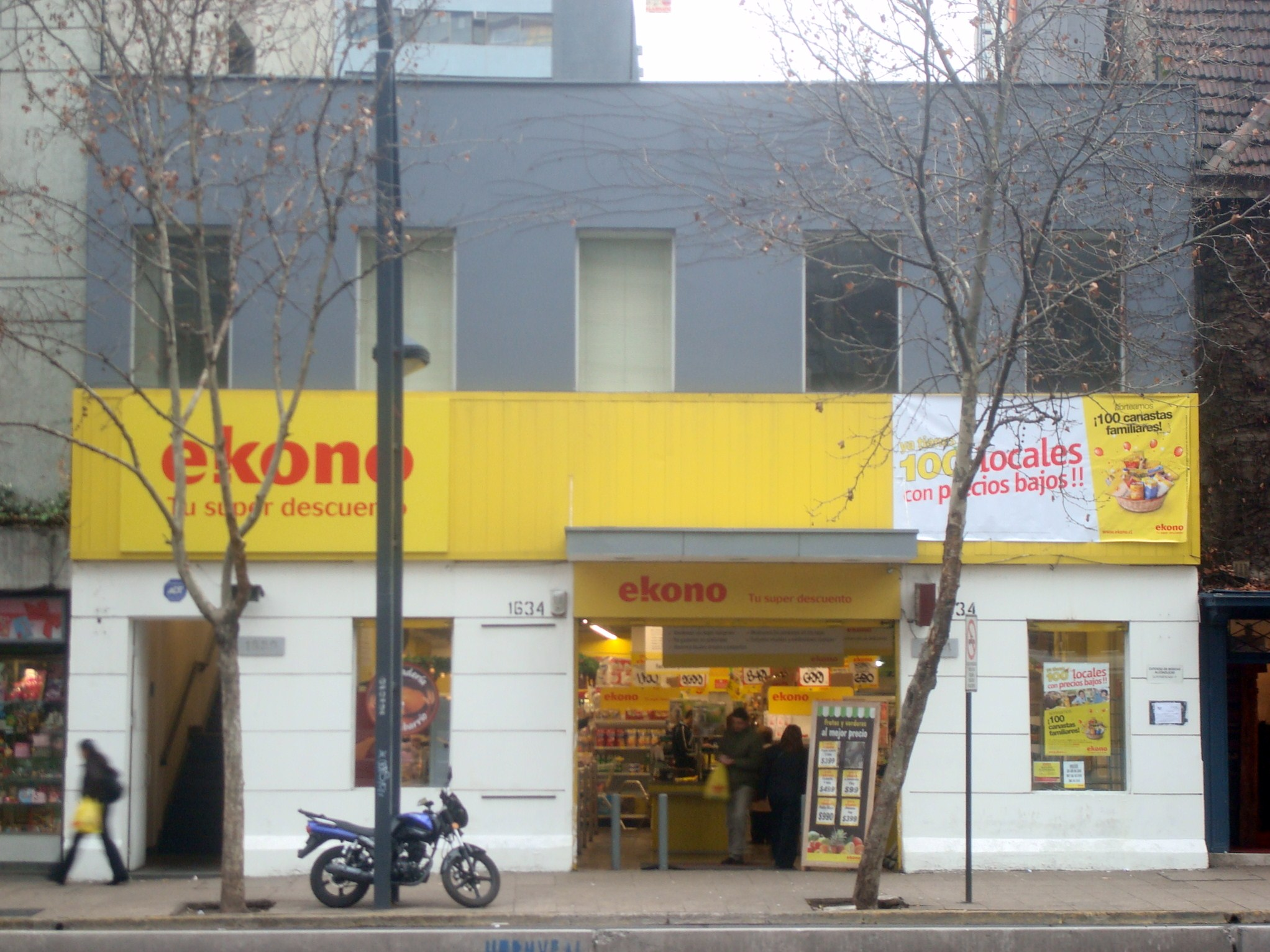 Ekono Providencia, Providencia, Santiago de Chile